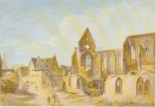 das ehemalige Dominikanerkloster in Mainz, erbaut im 14. Jahrhundert, zerstört am 20. Juni 1793, Ruinen